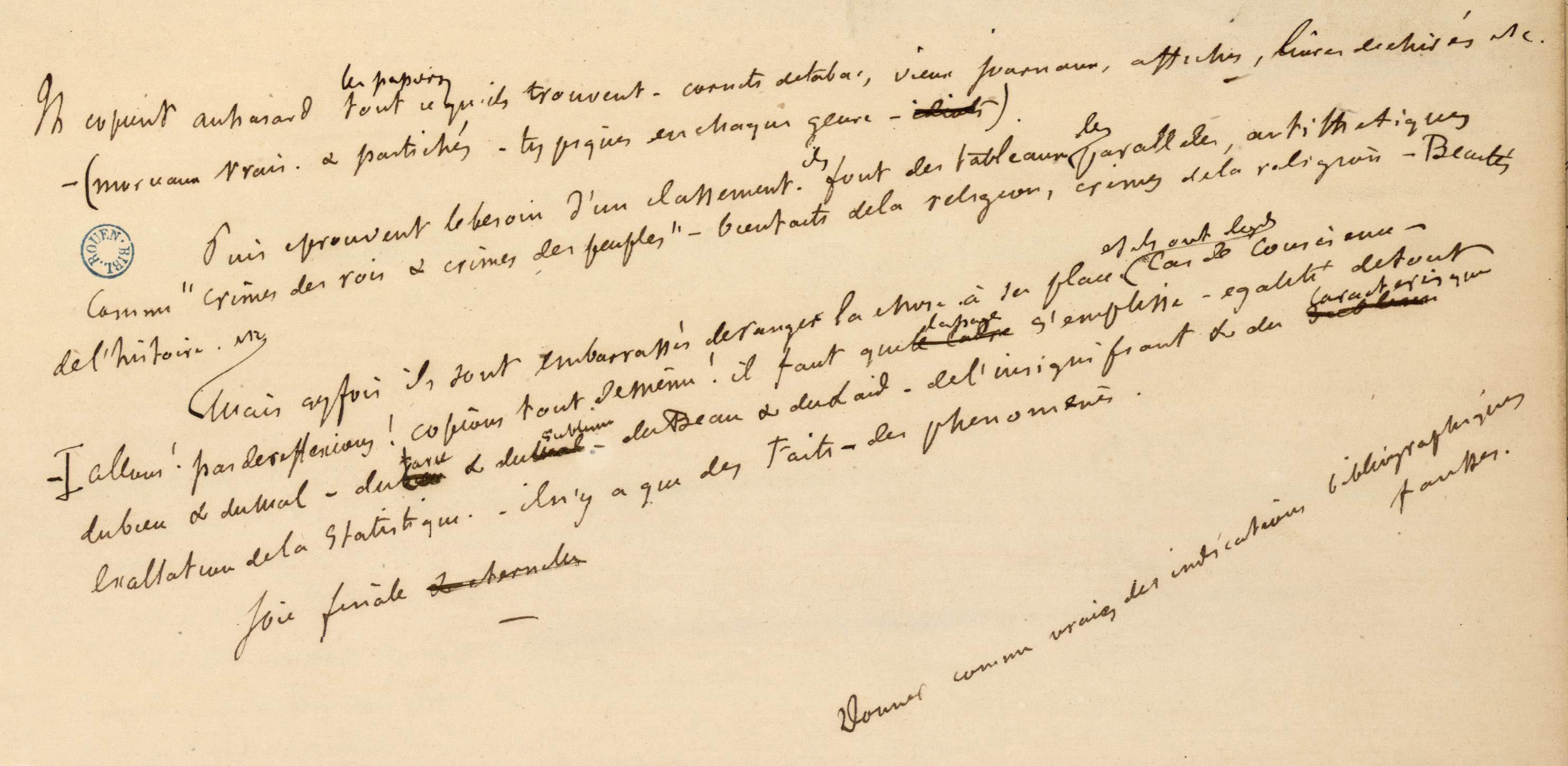 Manuscrit. Transcription disponible ici.